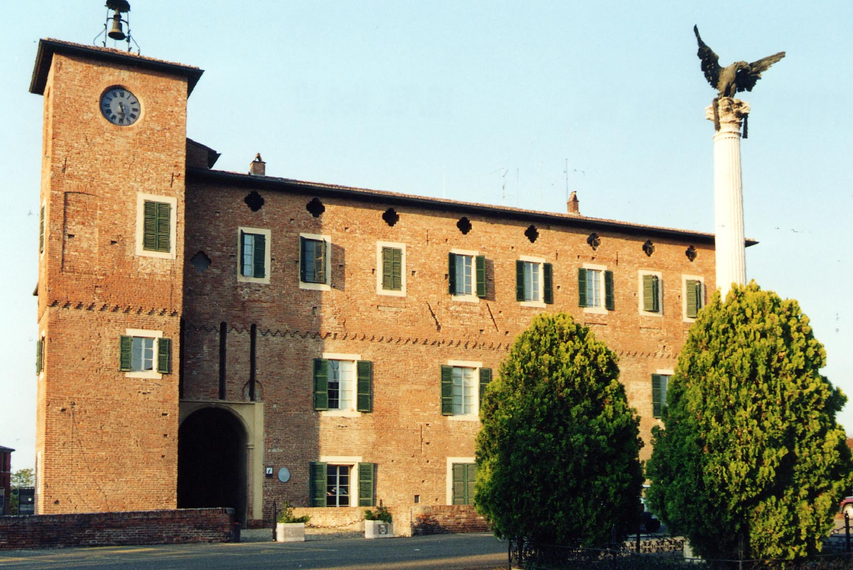 Autore: Magistrali